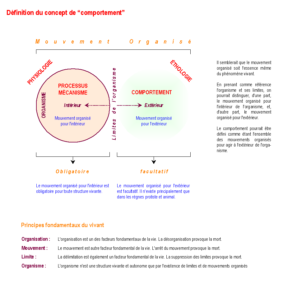 Definition of the concept of behavior. Labeling in French. Schéma concernant la définition générale du concept de "comportement" chez les organismes vivants.